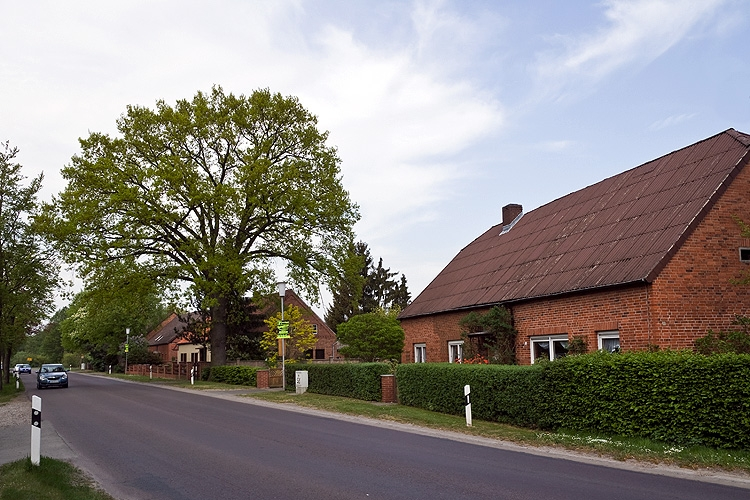 Ortserweiterung mit Abbauerstellen in Saaße. An der damaligen Land- und heutigen Bundesstraße 248 entstand in Saaße im 19. Jahrhundert eine Ortserweiterung mit acht Abbauerstellen.